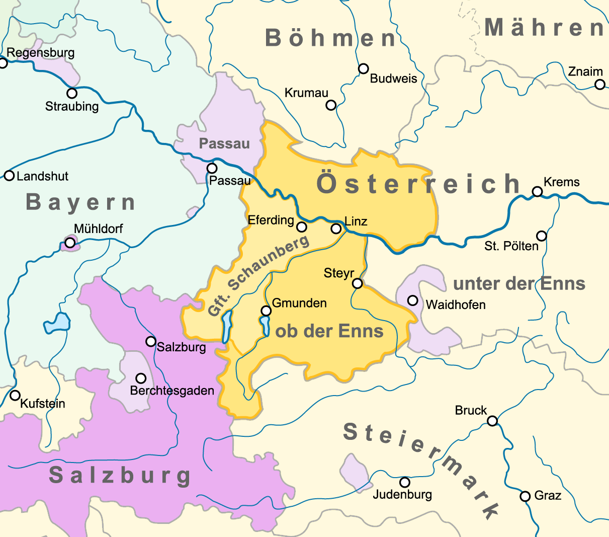 Karte von Österreich ob der Enns mit Grafschaft Schaunberg im Heiligen Römischen Reich zum Ende des 14. Jh.